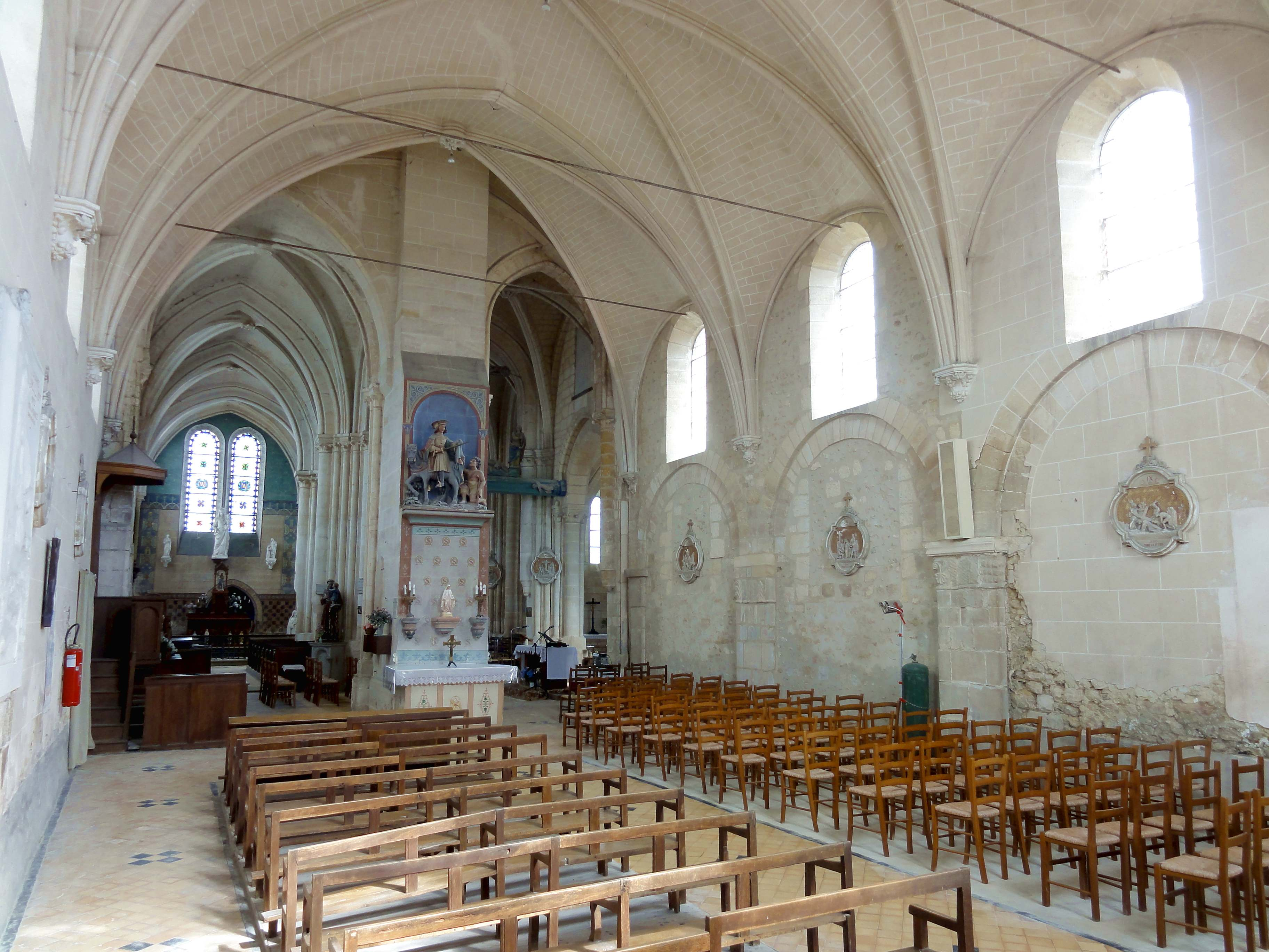 Intérieur de l'église - voir titre.